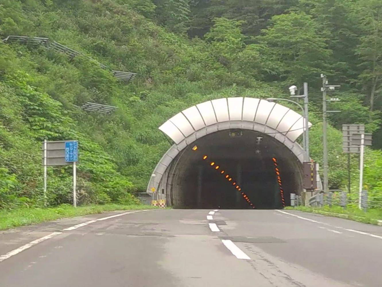 北海道道67号八雲厚沢部線・山蕗トンネル（厚沢部町側、2018年7月撮影）